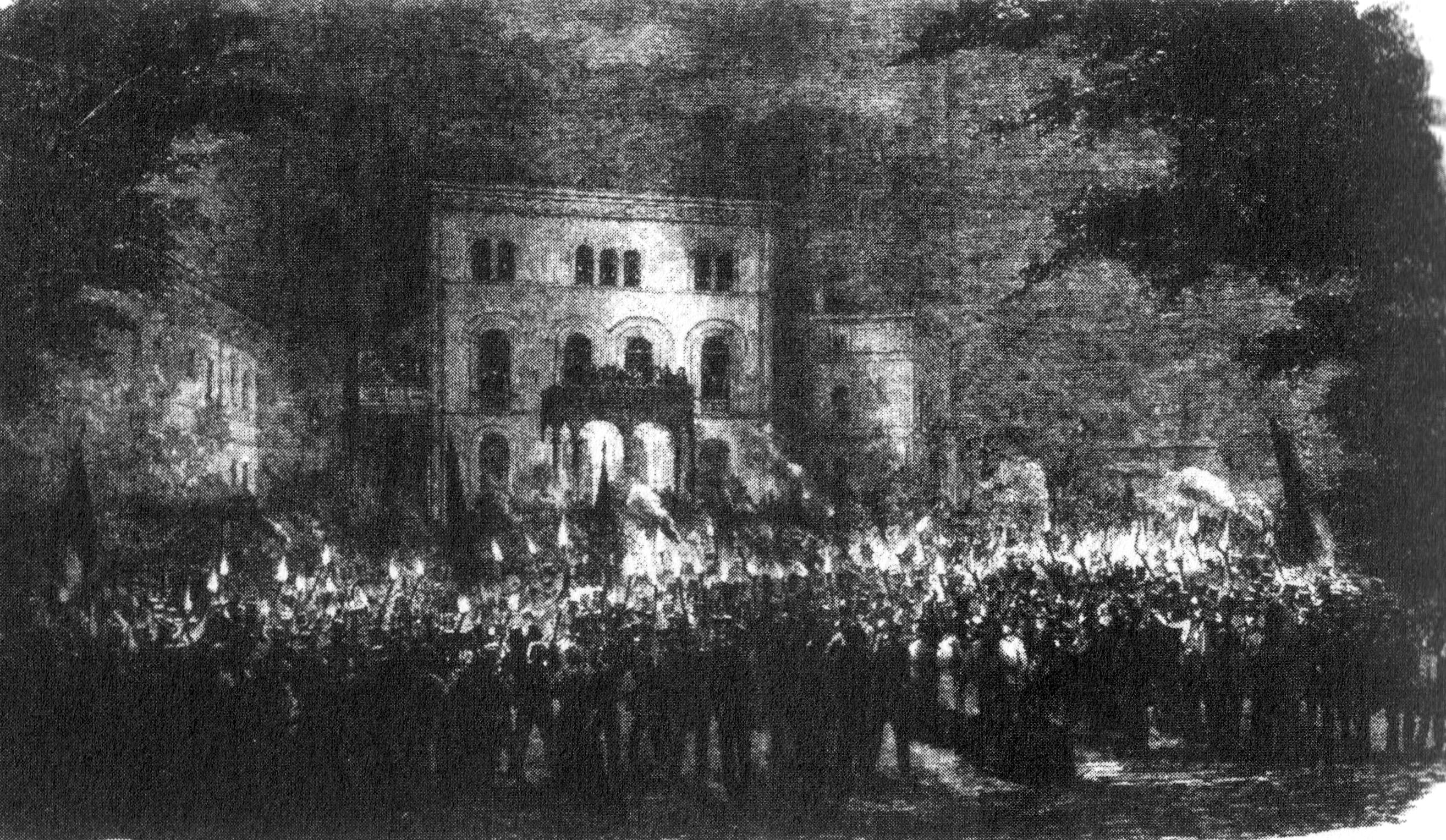 Illustrirte Zeitung, Leipzig, Nr. 259, 17. Juni 1848, 391. Fackelzug zu Ehren des Präsidenten der Nationalversammlung, Heinrich von Gagern.